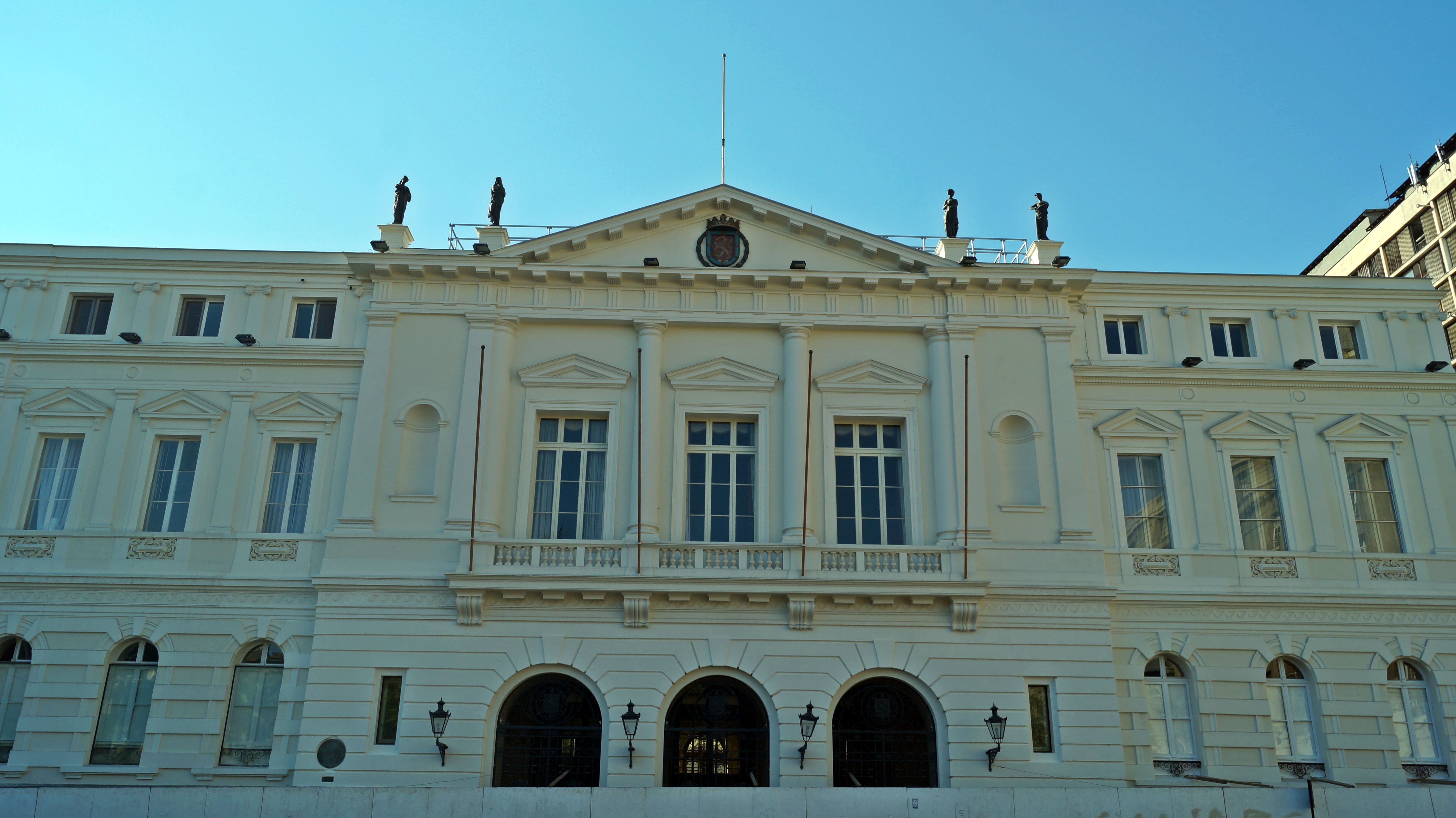 Edificio Consistorial de Santiago This is a photo of a national monument in Chile: 833